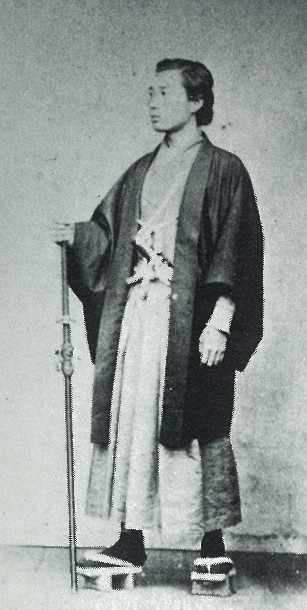 井口新助氏蔵、慶応年間撮影